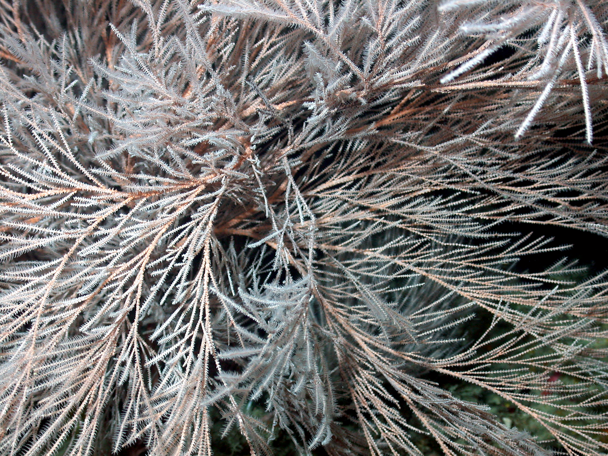 Aphanipathes Gulf of Mexico, Flower Garden Banks